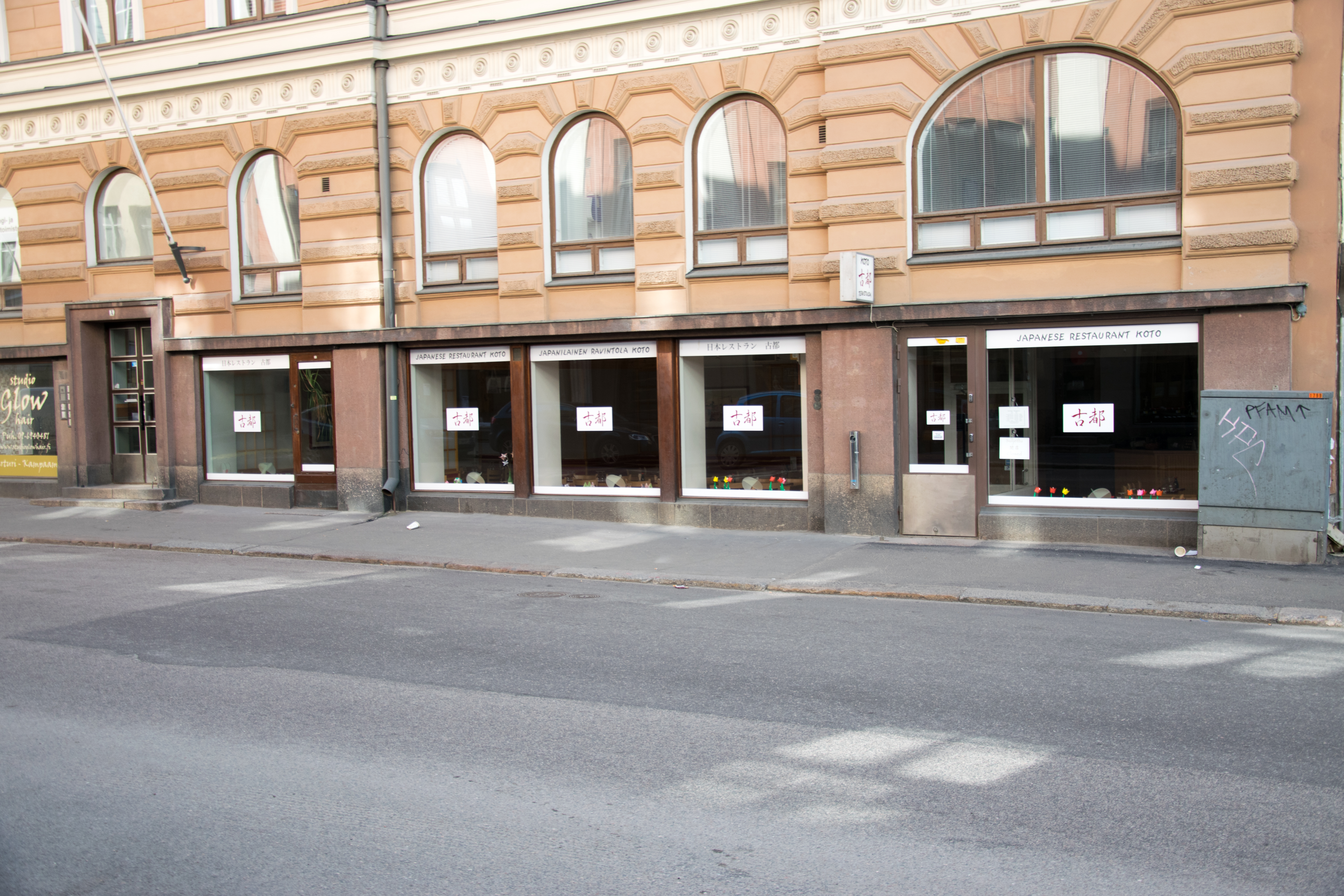 Ravintola Koto